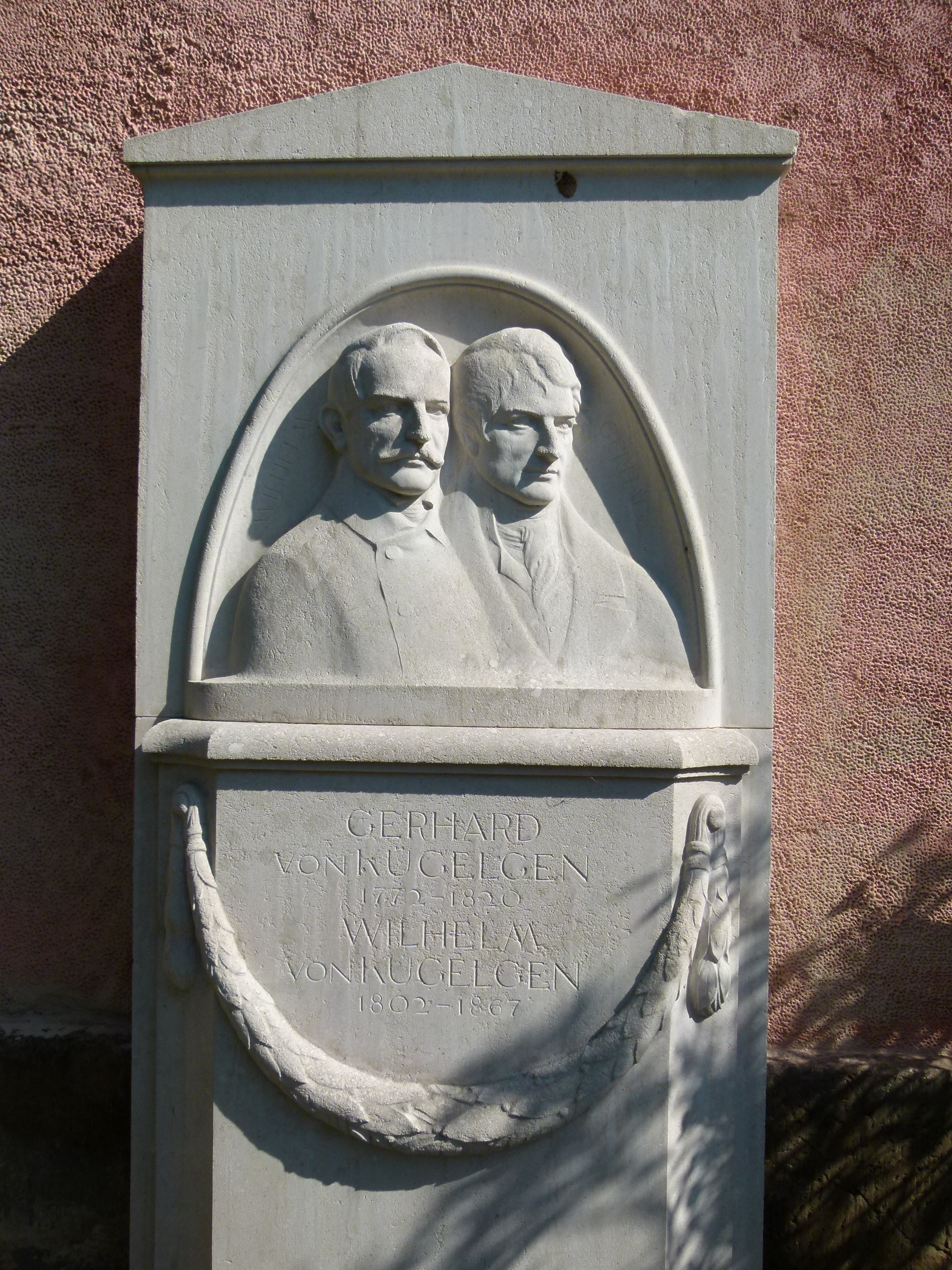 Gedenkstein für Gerhard Kügelgen und Wilhelm Kügelgen vor der Kirche in Loschwitz